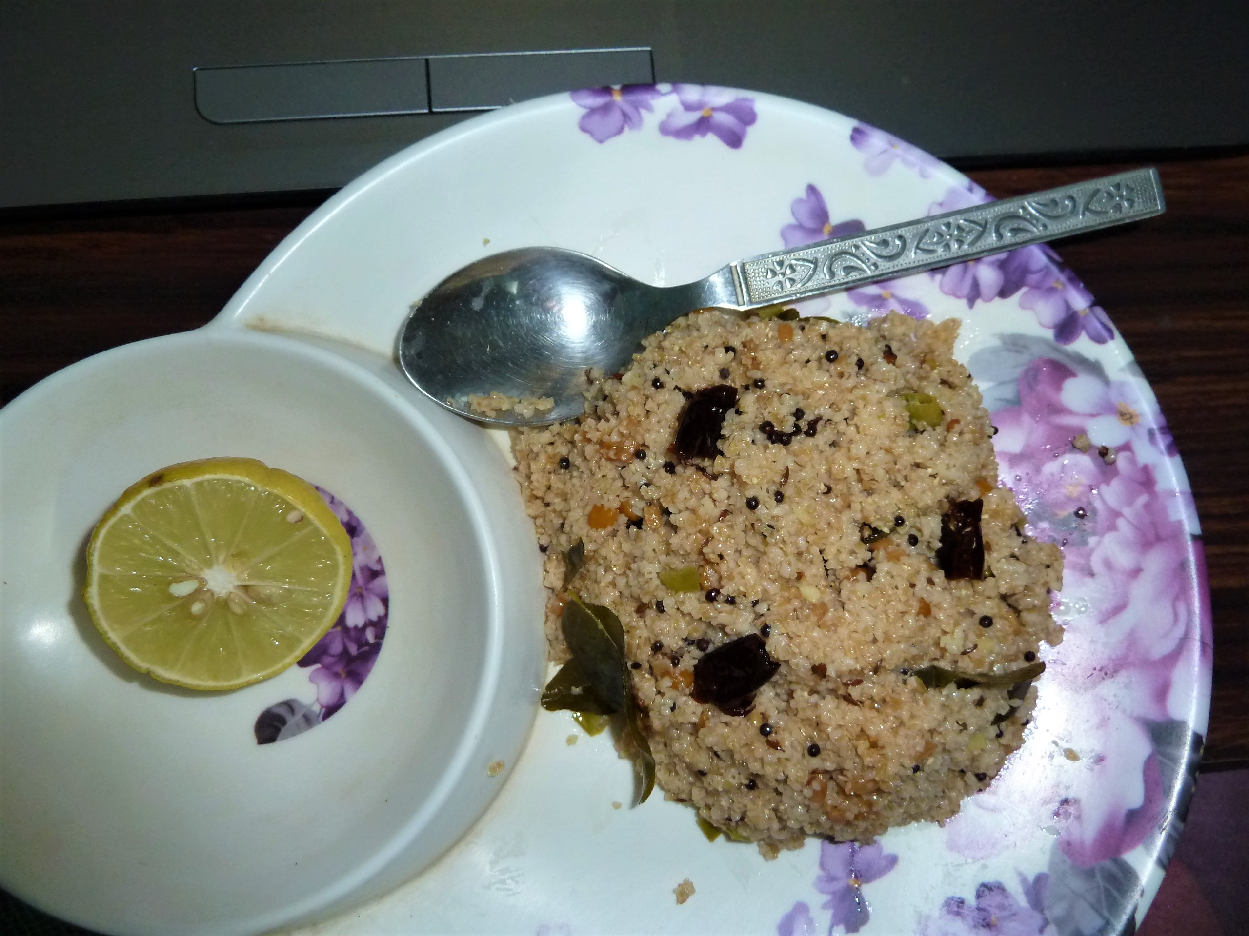 గోధుమ రవ్వ ఉప్మా